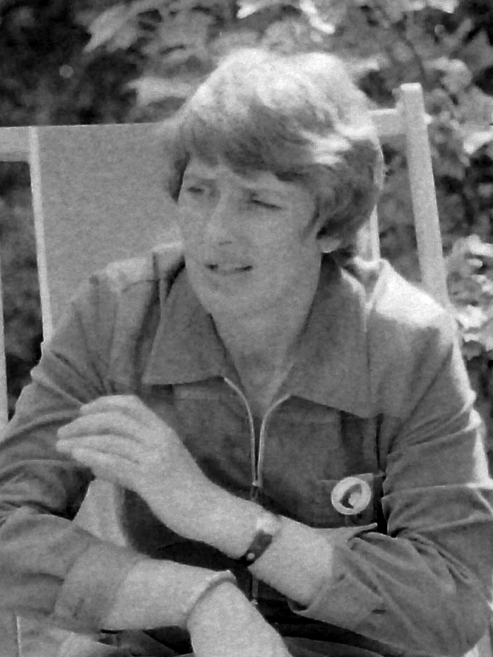 Maria Brigitta Catherina (Ria) Beckers-de Bruijn (Driebergen, 2 november 1938 - Wadenoijen, 22 maart 2006) was een Nederlands politica. Zij was tussen 1977 en 1993 lid van de Tweede Kamer namens achtereenvolgens de Politieke Partij Radikalen (PPR) en GroenLinks. Zij was zowel de eerste vrouwelijke lijsttrekker voor de Tweede Kamerverkiezingen (in 1977) als de eerste vrouwelijke fractievoorzitter in het Nederlandse parlement (vanaf 1977). -- Ria Beckers tijdens een tuinbijeenkomst bij PPR-leden in Sauwerd. (mei 1981)